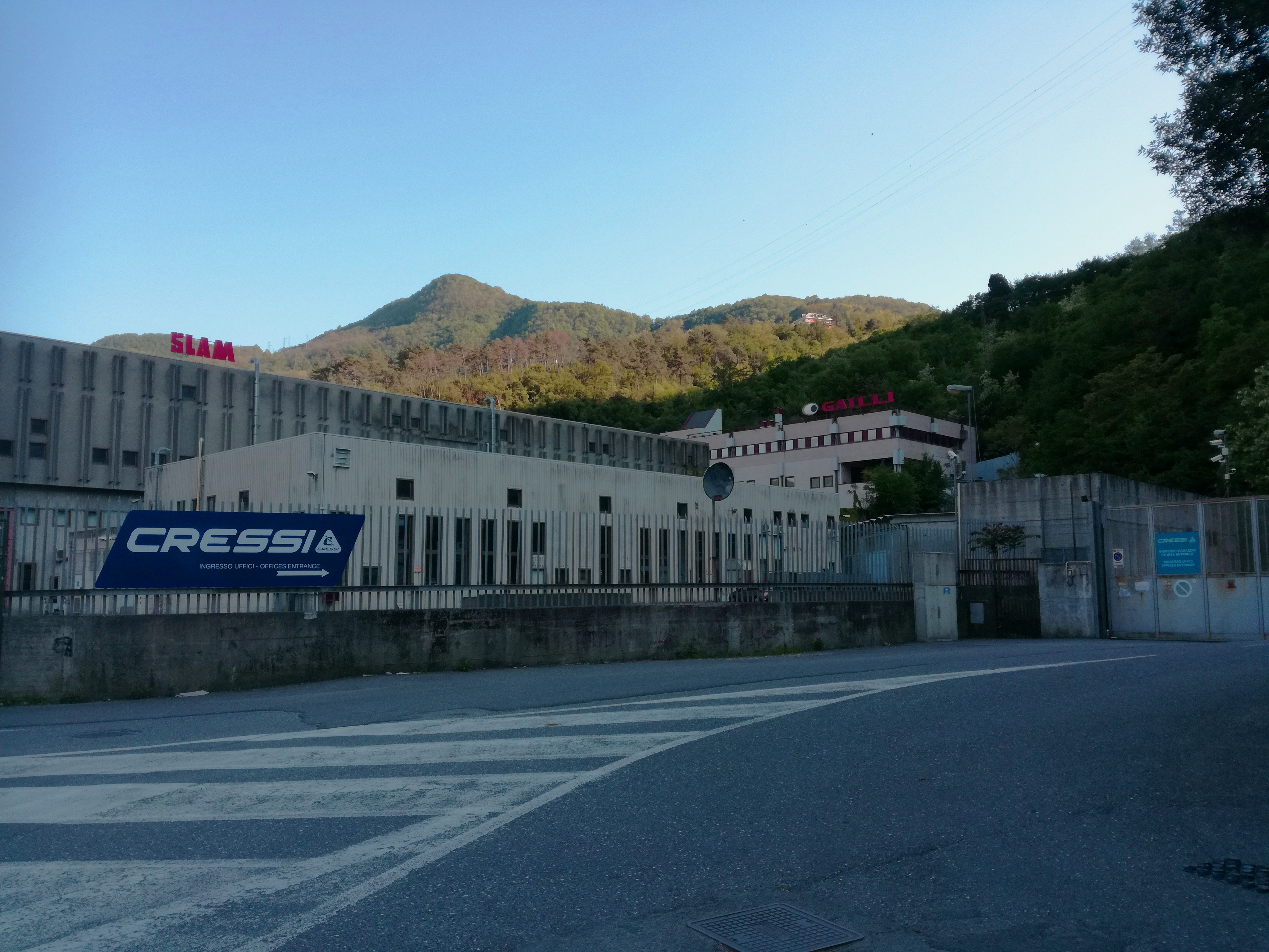 La sede principale del gruppo Cressi Sub, in Via Adamoli (Genova)